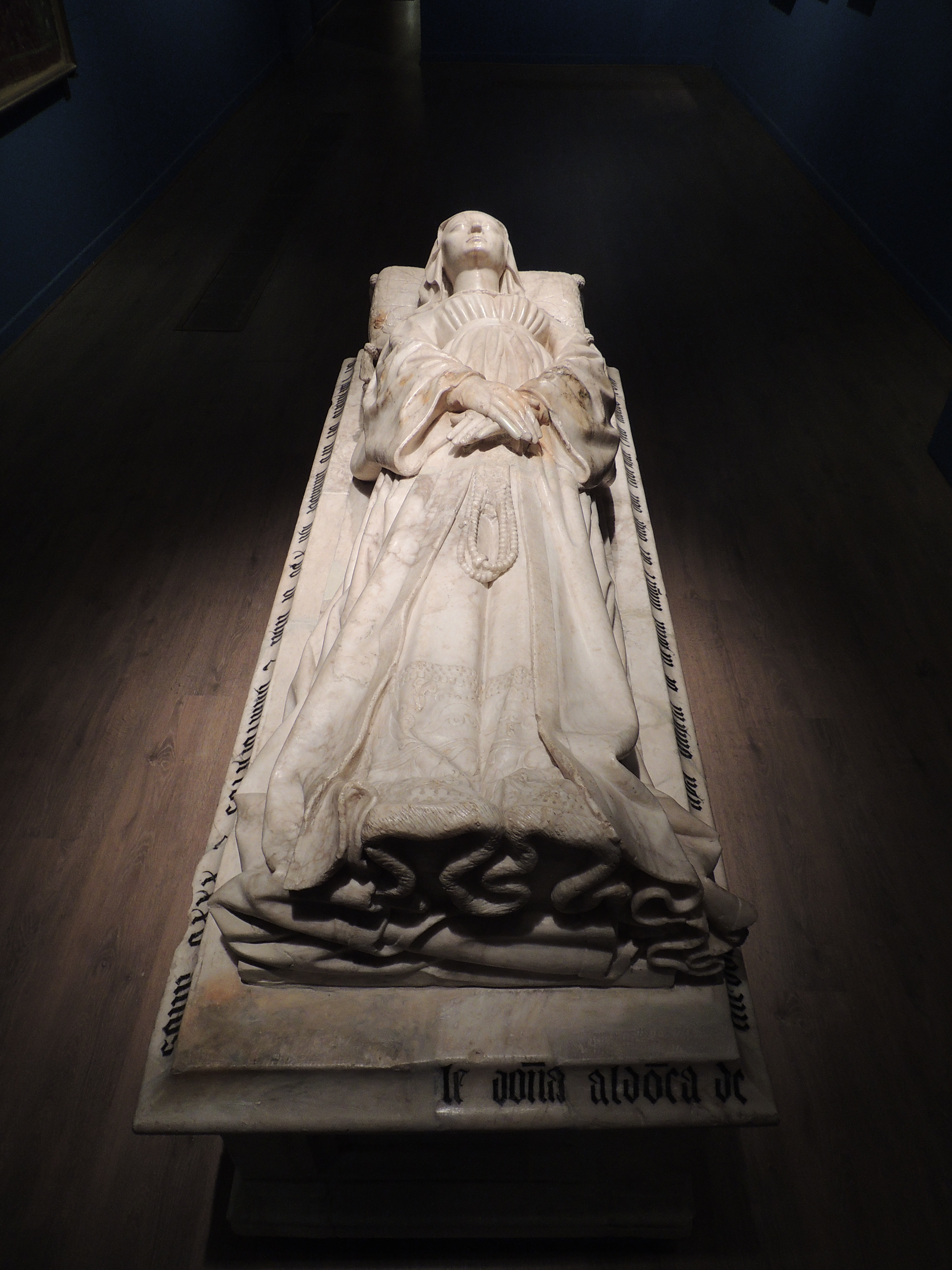 Sepulcro de la duquesa Aldonza de Mendoza († 1435), que fue hija de Diego Hurtado de Mendoza, almirante de Castilla, y esposa de Fadrique Enríquez de Castilla, duque de Arjona y conde de Trastámara.